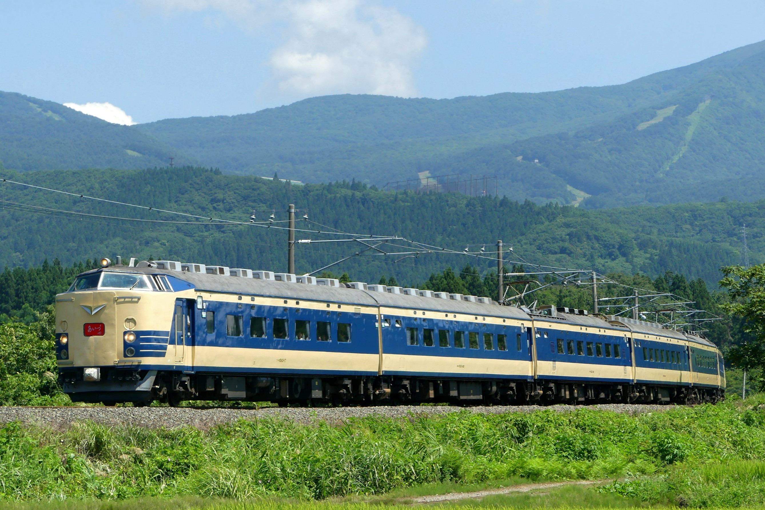 583系特急型電車による磐越西線の快速あいづライナー